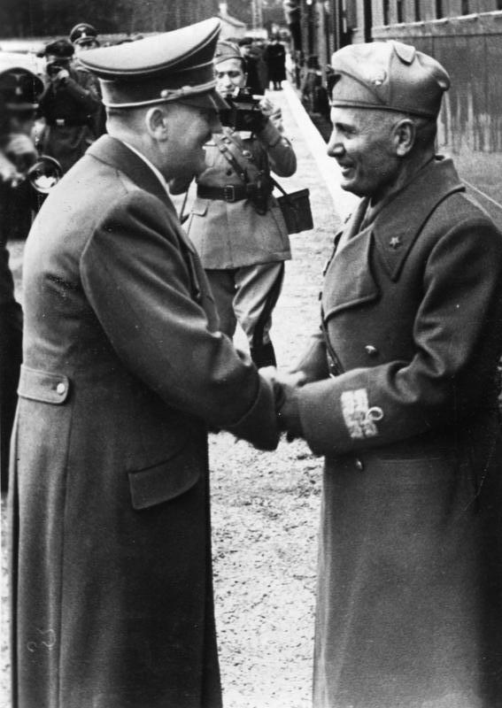 Adolf Hitler, Benito Mussolini Die Begegnung Führer-Duce In der Zeit vom 7. bis 10. April hatten der Führer und der Duce eine Zusammenkunft, an der italienischerseits der Chef des italienischen Generalstabs, Armeegeneral Ambrosio, und der Staatssekretär für die Auswärtigen Angelegenheiten, Bastianini, deutscherseits Reichsmarschall Hermann Göring, der Reichsminister des Auswärtigen v. Ribbentrop, der Chef des Oberkommandos der Wehrmacht , Generalfeldmarschall Keitel, der Oberbefehlshaber der Kriegsmarine, Großadmiral Dönitz, und der Chef des Generalstabes des Heeres, General Zeitzler, teilnahmen. In den umfassenden Besprechungen, in denen sowohl die allgemeine politische Lage als auch alle Fragen der gemeinsamen Kriegsführung in völliger Uebereinstimmung behandelt wurden, gaben der Duce und der Führer ihrer und ihren Völker unbeugsame Entschlossenheit erneut zum Ausdruck, den Krieg durch den totalen Einsatz aller Kräfte bis zum endgültigen Sieg zu führen. Unser Bild zeigt: Der Führer begrüßt den Duce bei seiner Ankunft. Bei Abdruck unter allen Umständen nennen: Scherl Bilderdienst - Gerd Baatz (Laux) 12.4.43 [Herausgabedatum] 1876-43 Abgebildete Personen: Hitler, Adolf: Reichskanzler, Deutschland Mussolini, Benito: Ministerpräsident, Regierungschef, Chef des Faschistischen Großrates, Italien